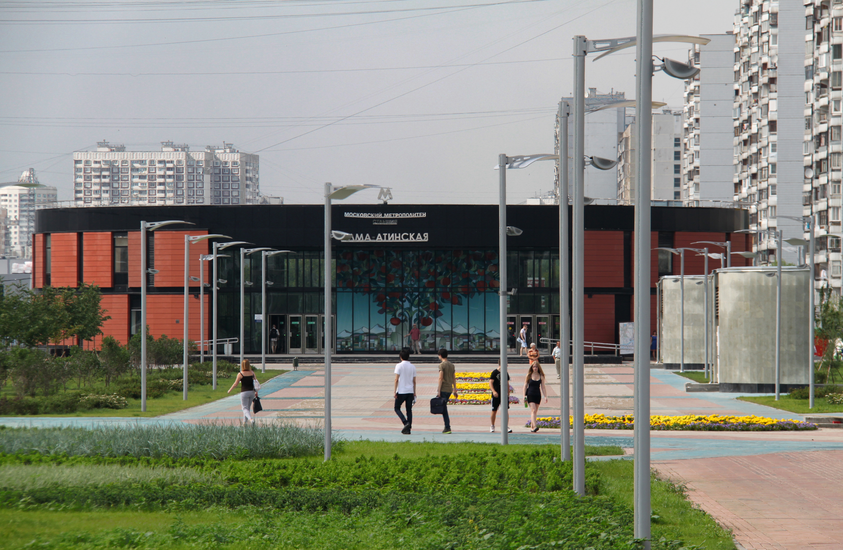 Станция метро Алма-Атинская. Северный вестибюль